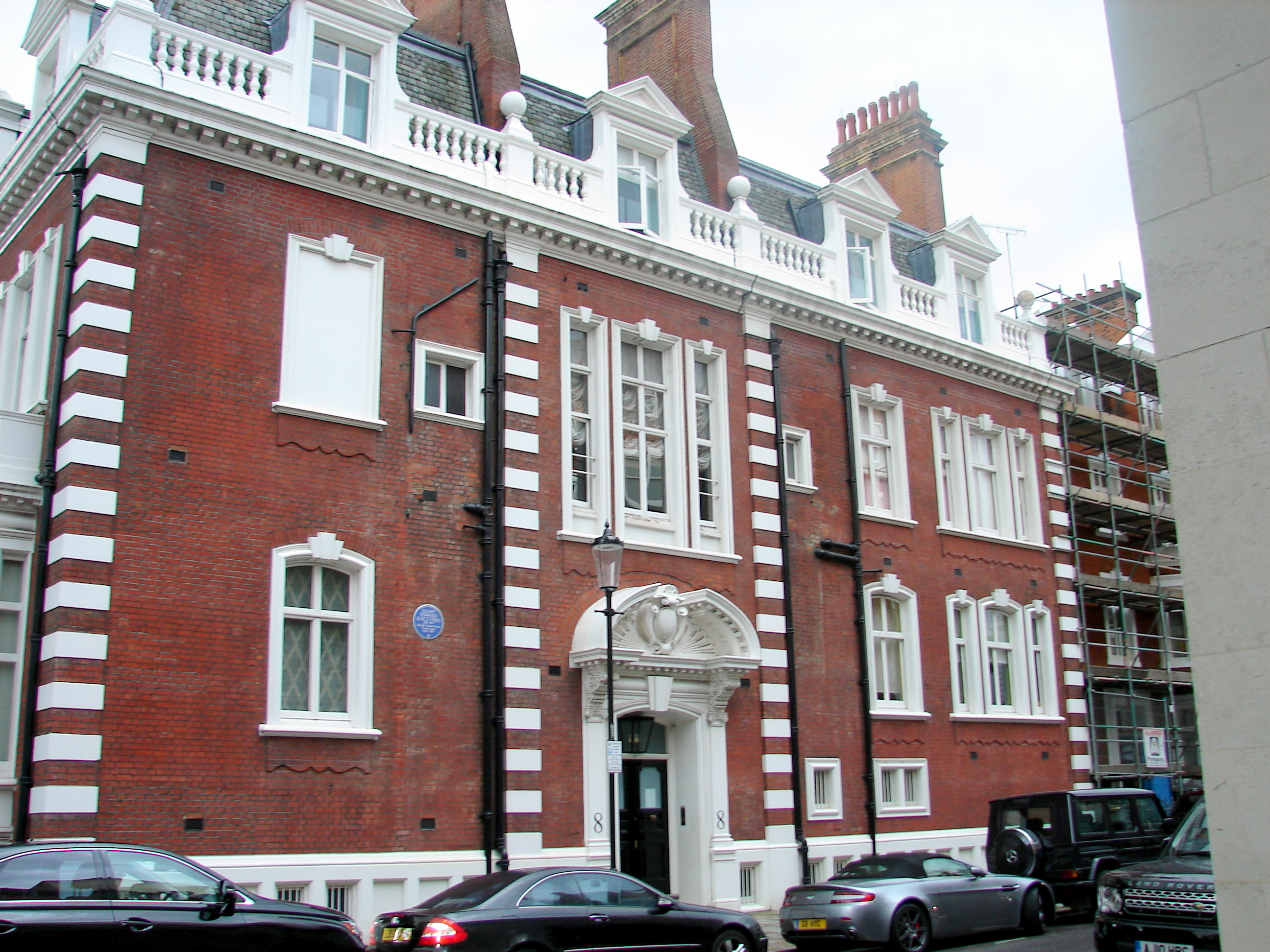 Count Edward Raczynski